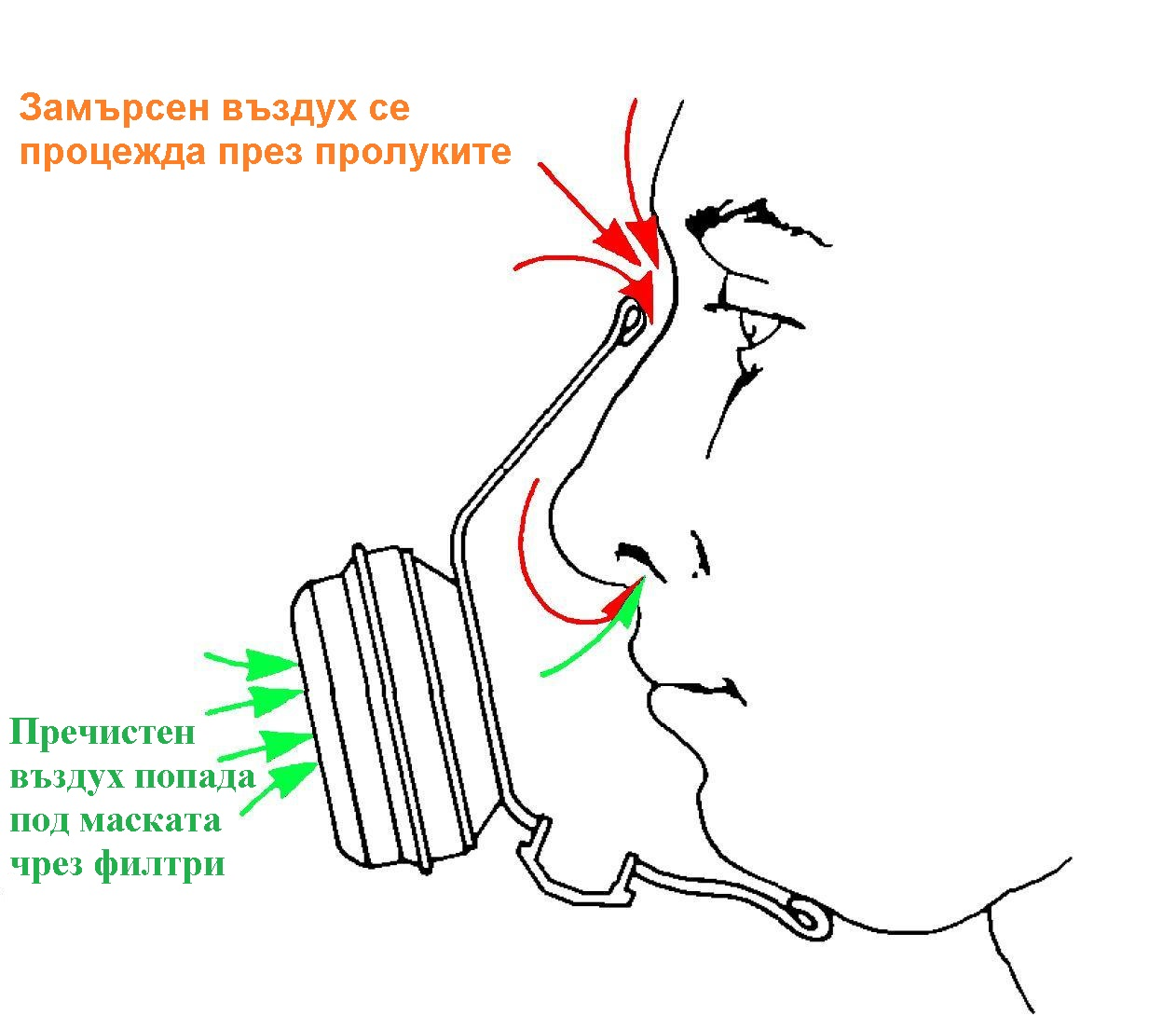 Просачивание неотфильтрованного воздуха через зазоры между маской и лицом - одна из главных причин низких защитных свойств респираторов, у которых при вдохе давление воздуха под маской ниже наружного